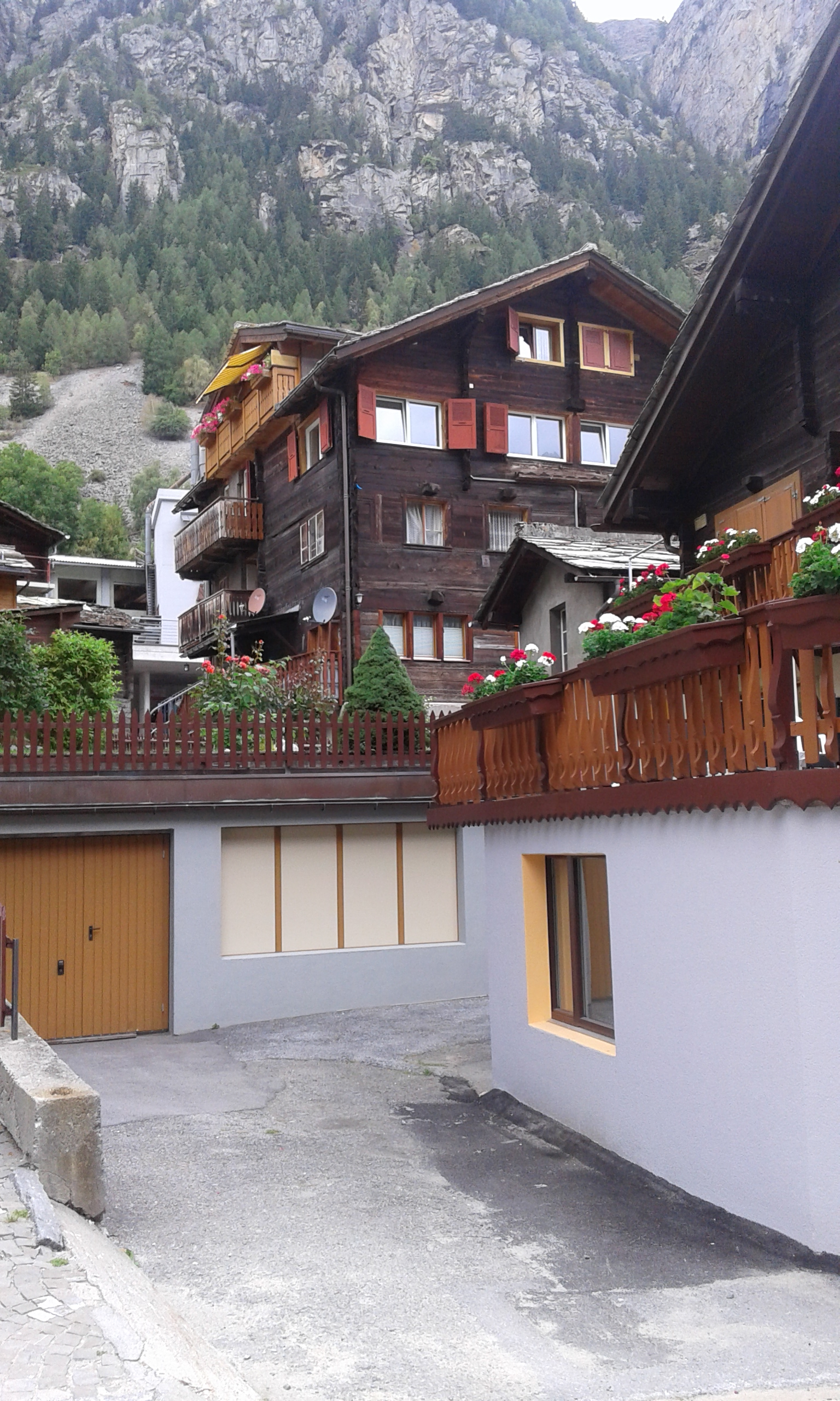 Alois Pollinger lebte von 1844 bis 1910 und ist der Erfinder des Abseilens mit doppeltem Seil. Aufnahme von der Dorfstrasse St. Niklaus VS.